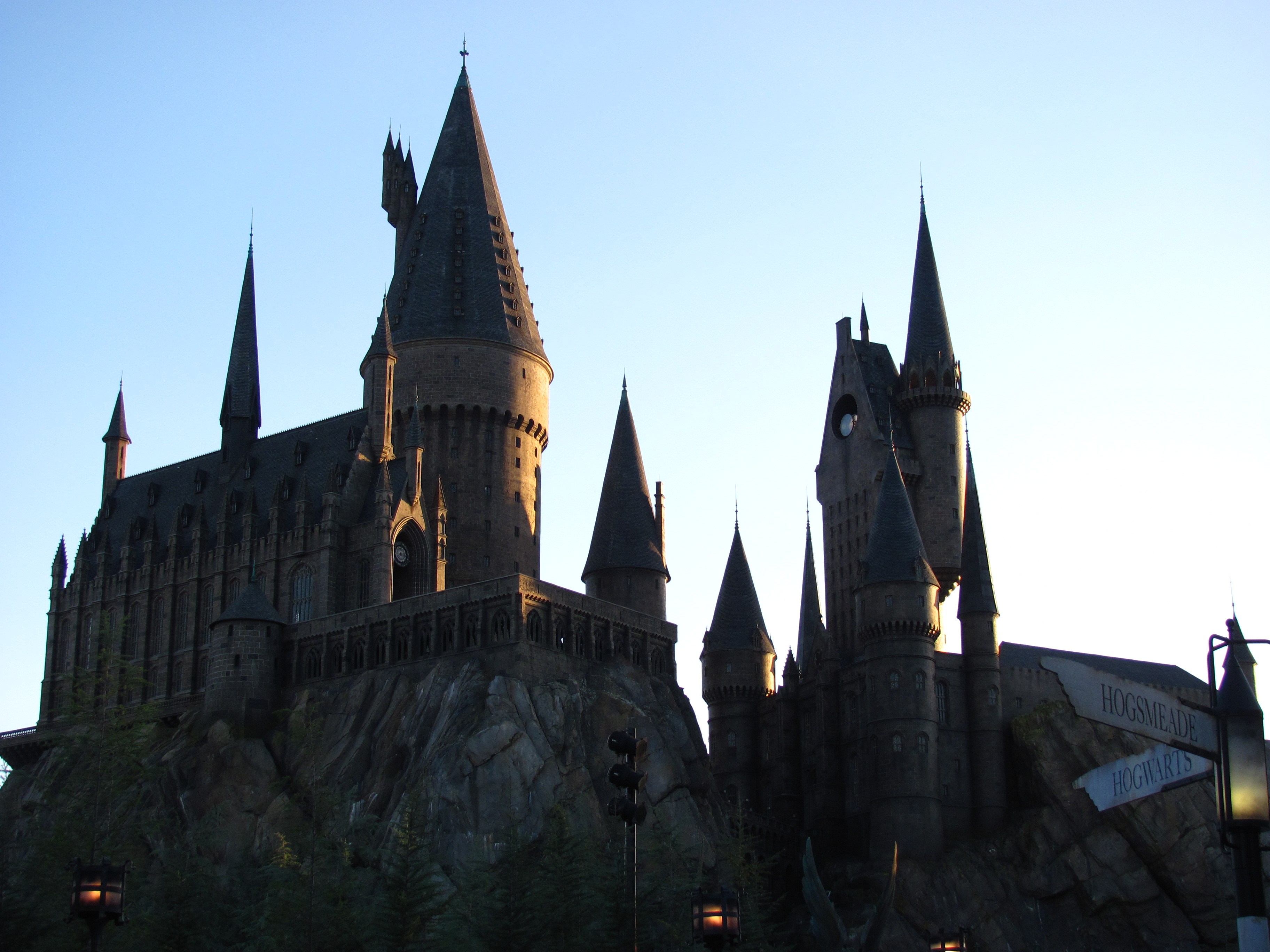 Hogwarts